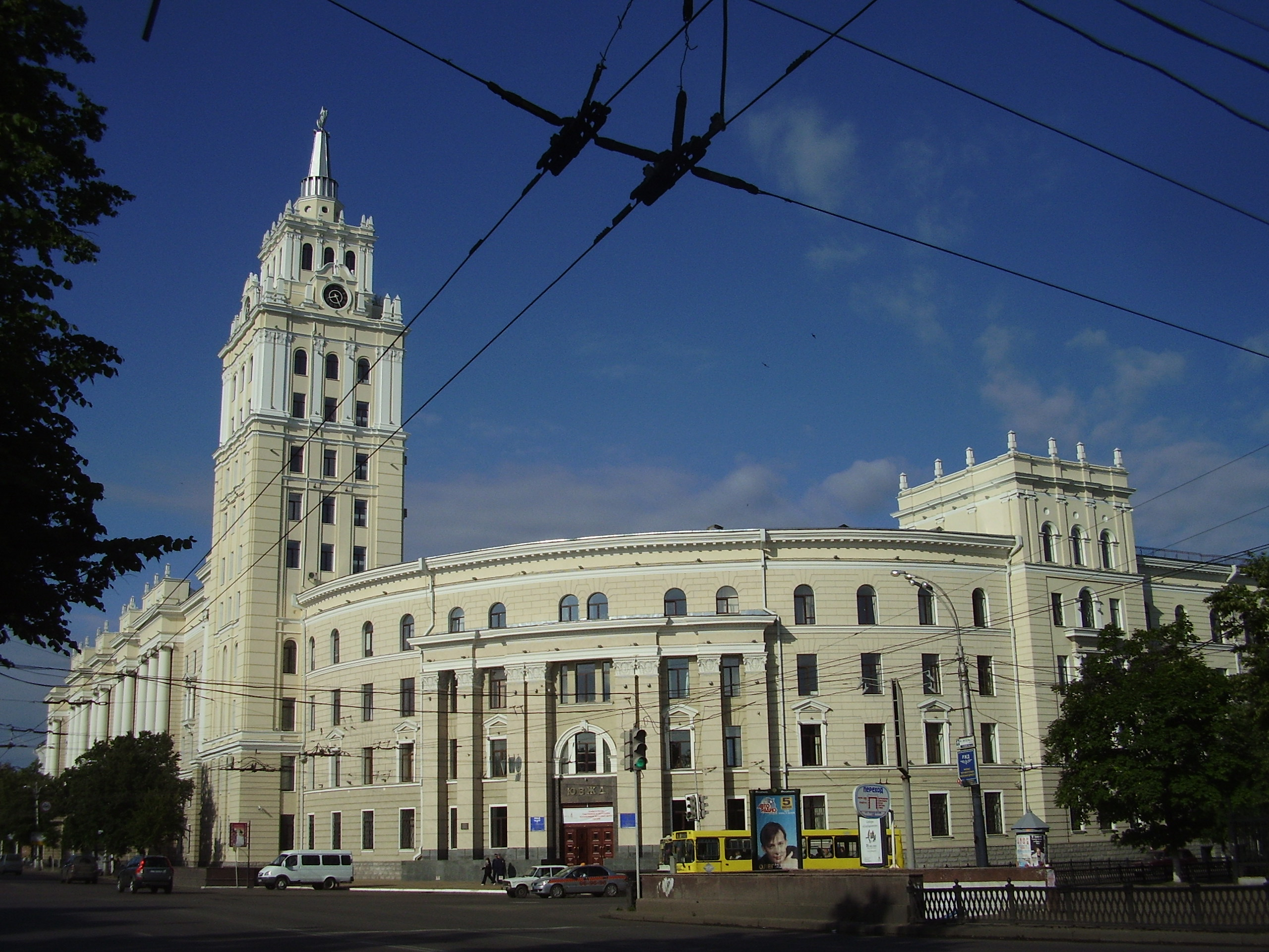 Воронеж. Управление Юго-восточной железной дороги